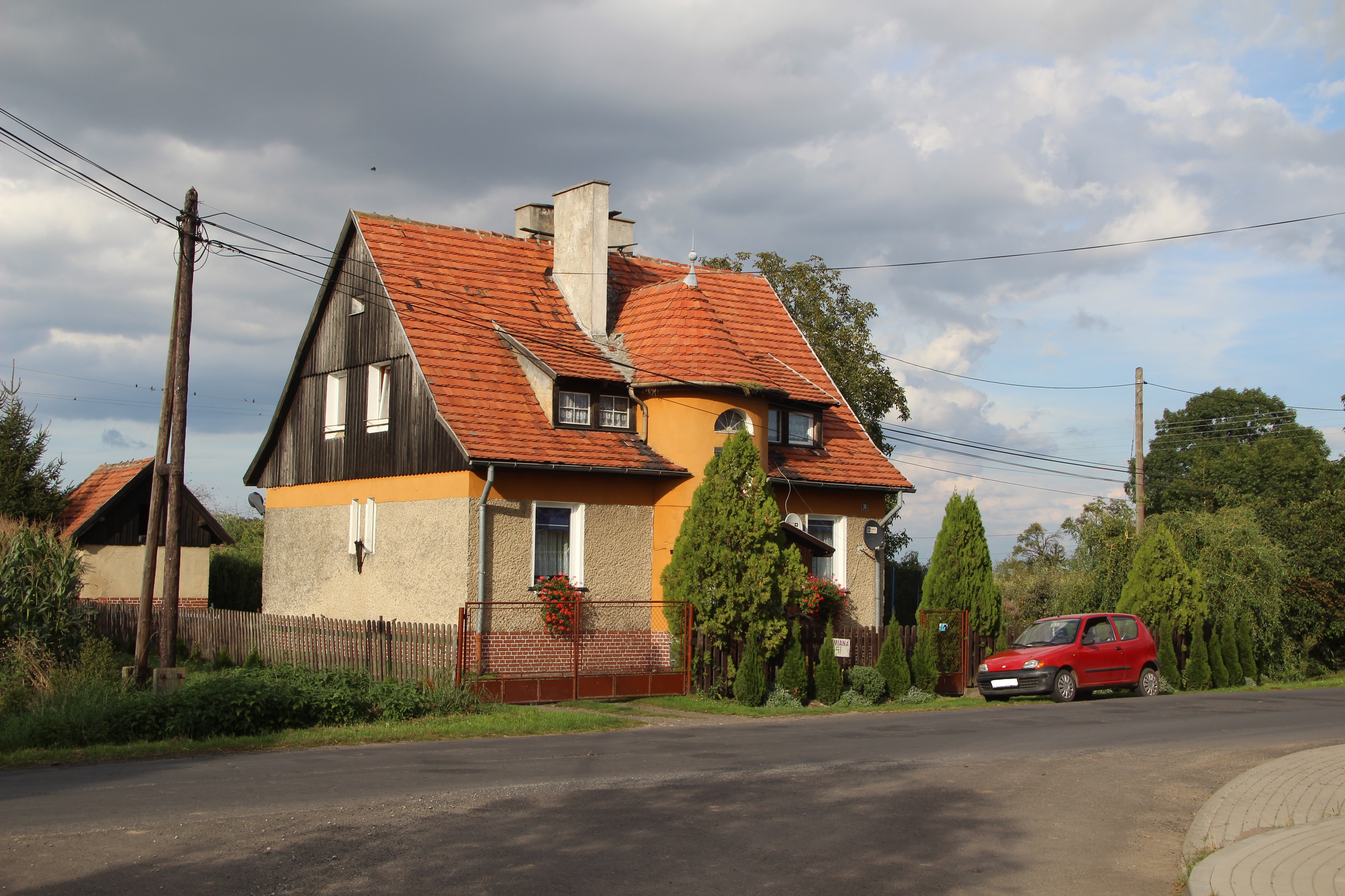 Karłowice Małe – wieś w Polsce położona w województwie opolskim, w powiecie nyskim, w gminie Kamiennik.